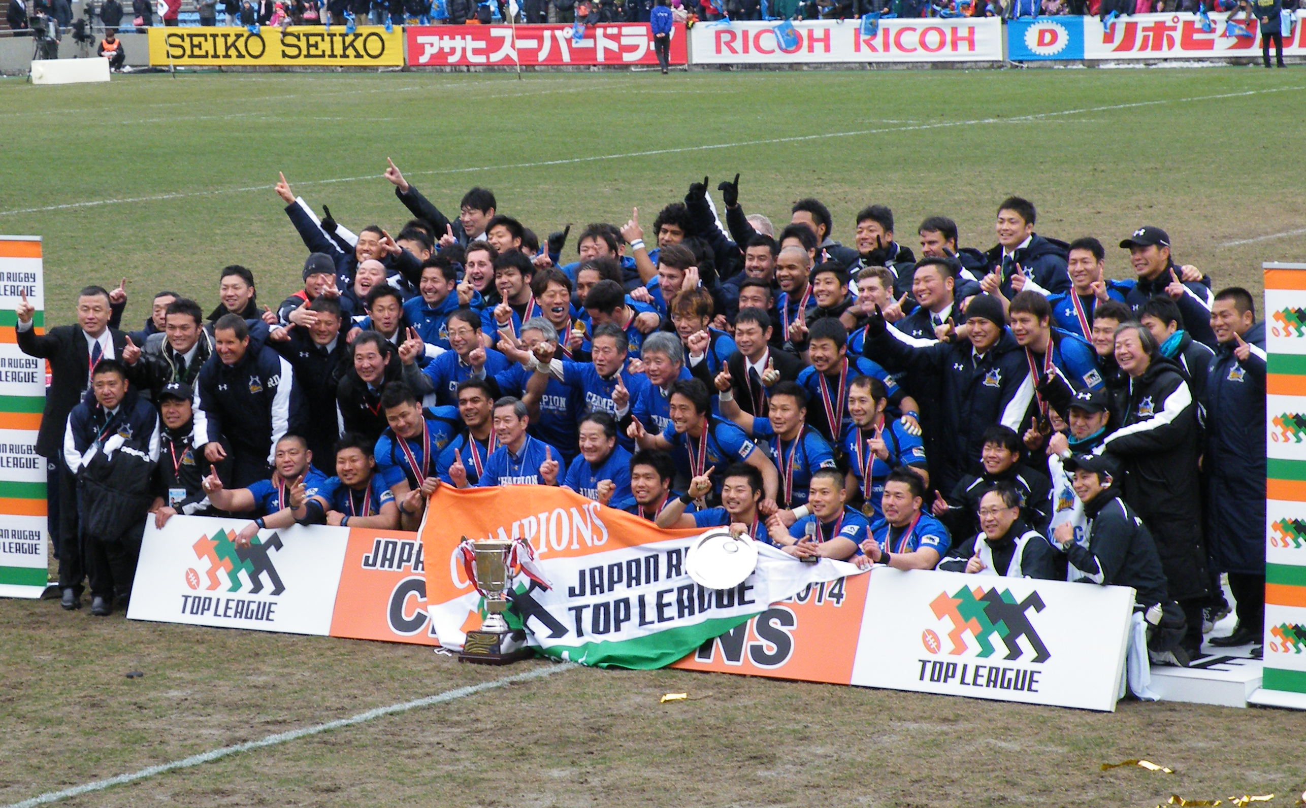 ジャパンラグビートップリーグ2013-2014優勝のパナソニックワイルドナイツ